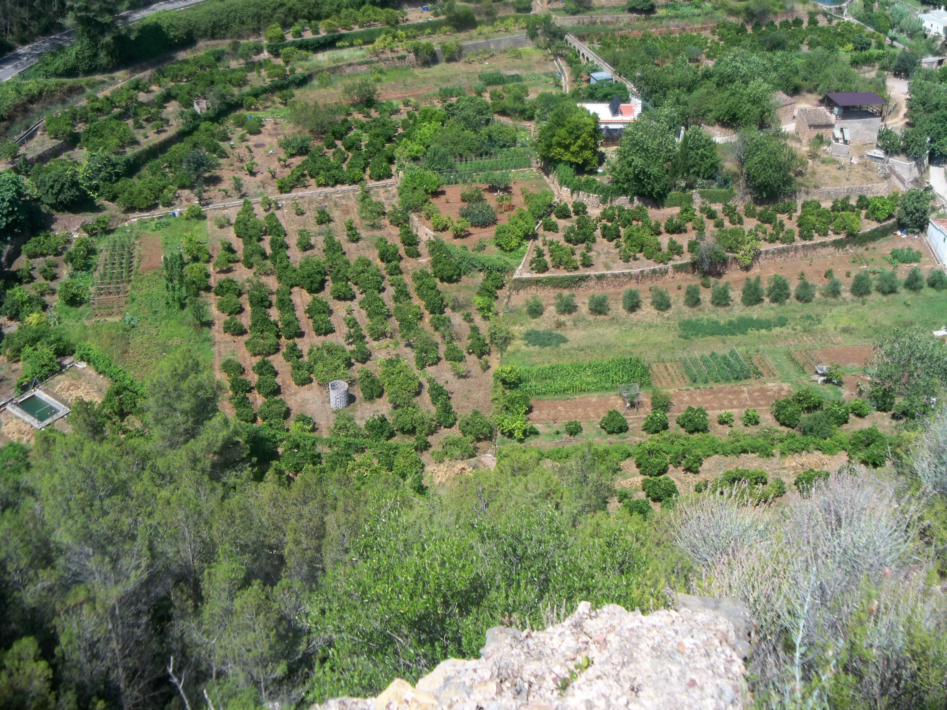 Vista de "el Clot" desde el Castillo de Tales